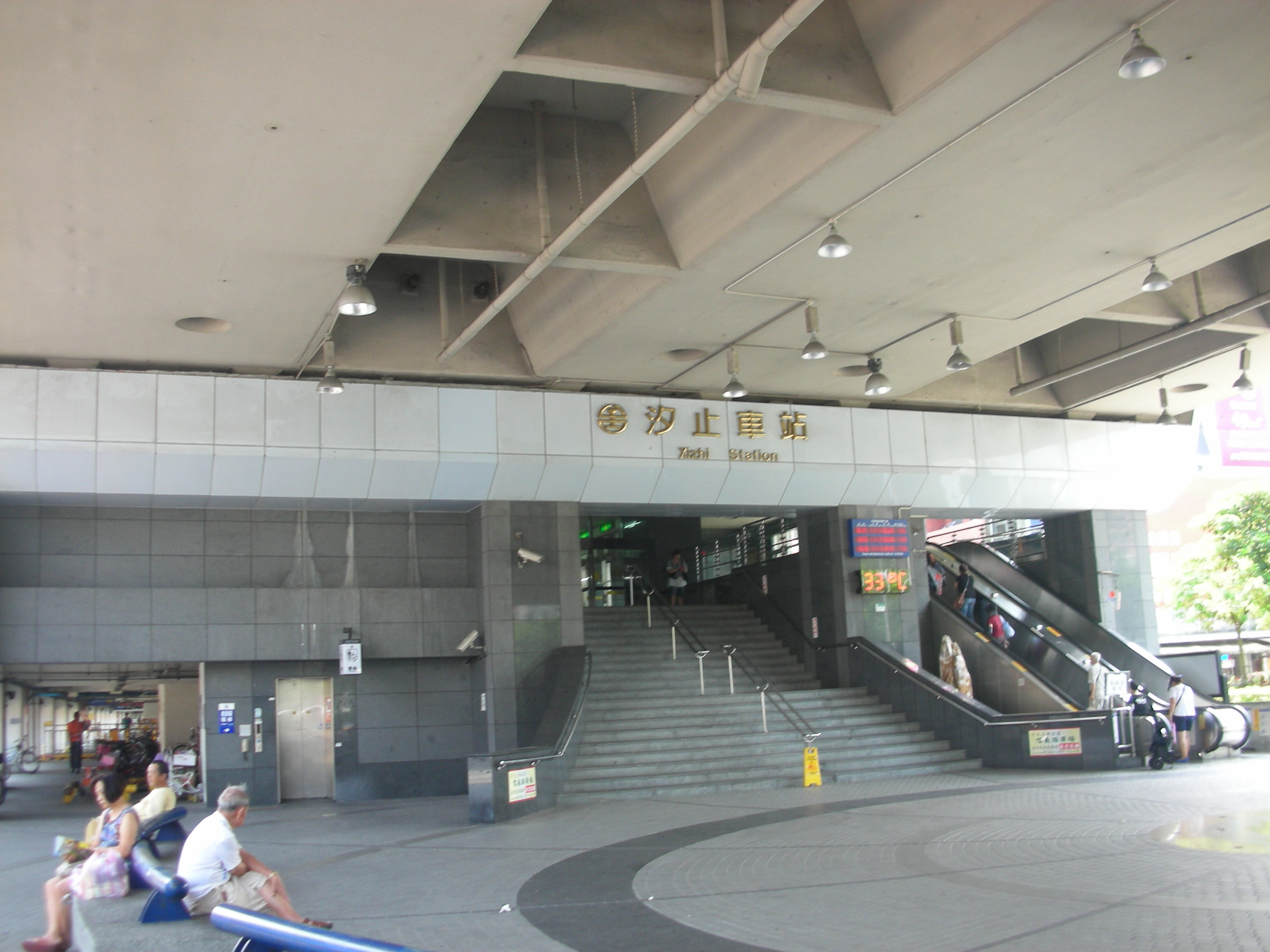 臺灣鐵路管理局汐止車站東出口，下方連接信義路廣場。